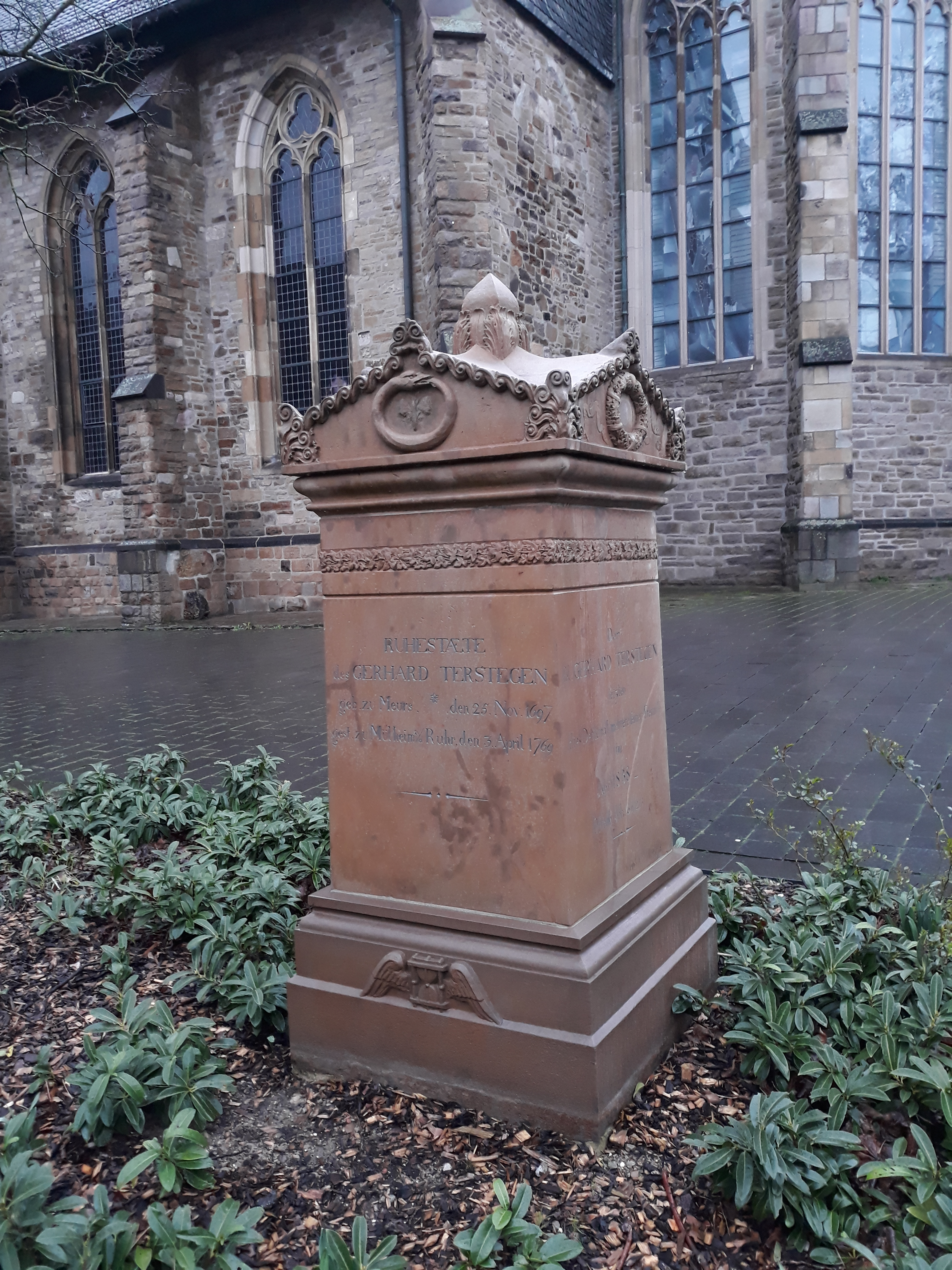 Der Grabstein des deutschen Kirchenlieddichters Gerhard Tersteegen an der Petrikirche in Mülheim an der Ruhr.